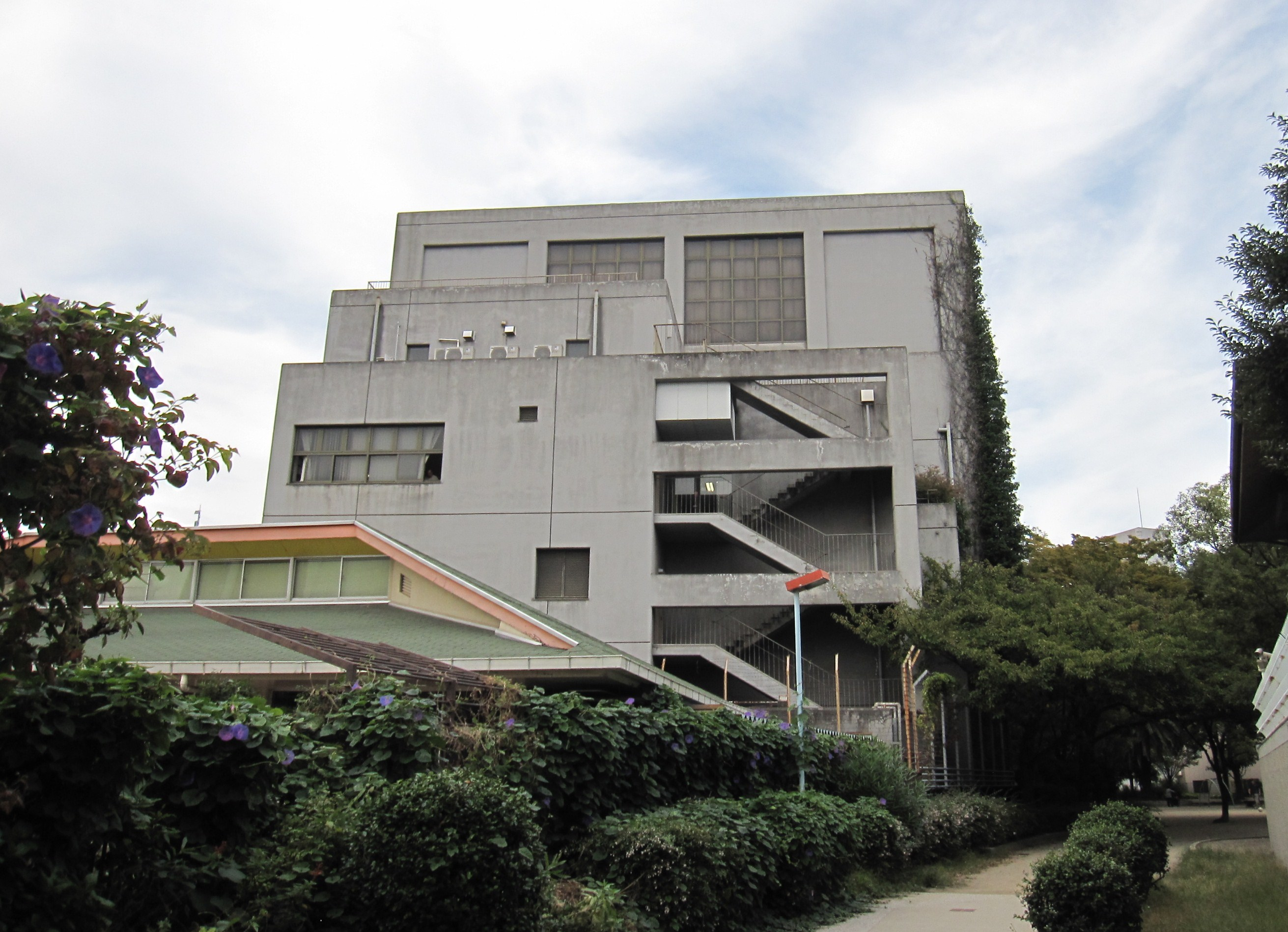 大阪市立福島図書館